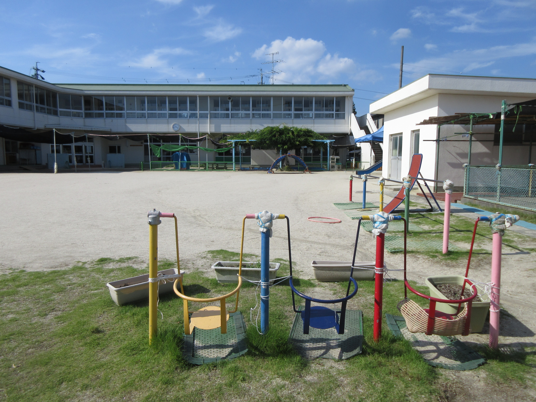 岡崎市大樹寺保育園（岡崎市鴨田町）